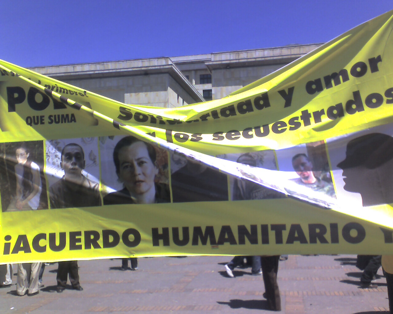 Foto: Germán Cabrejo, especial para equinoXio